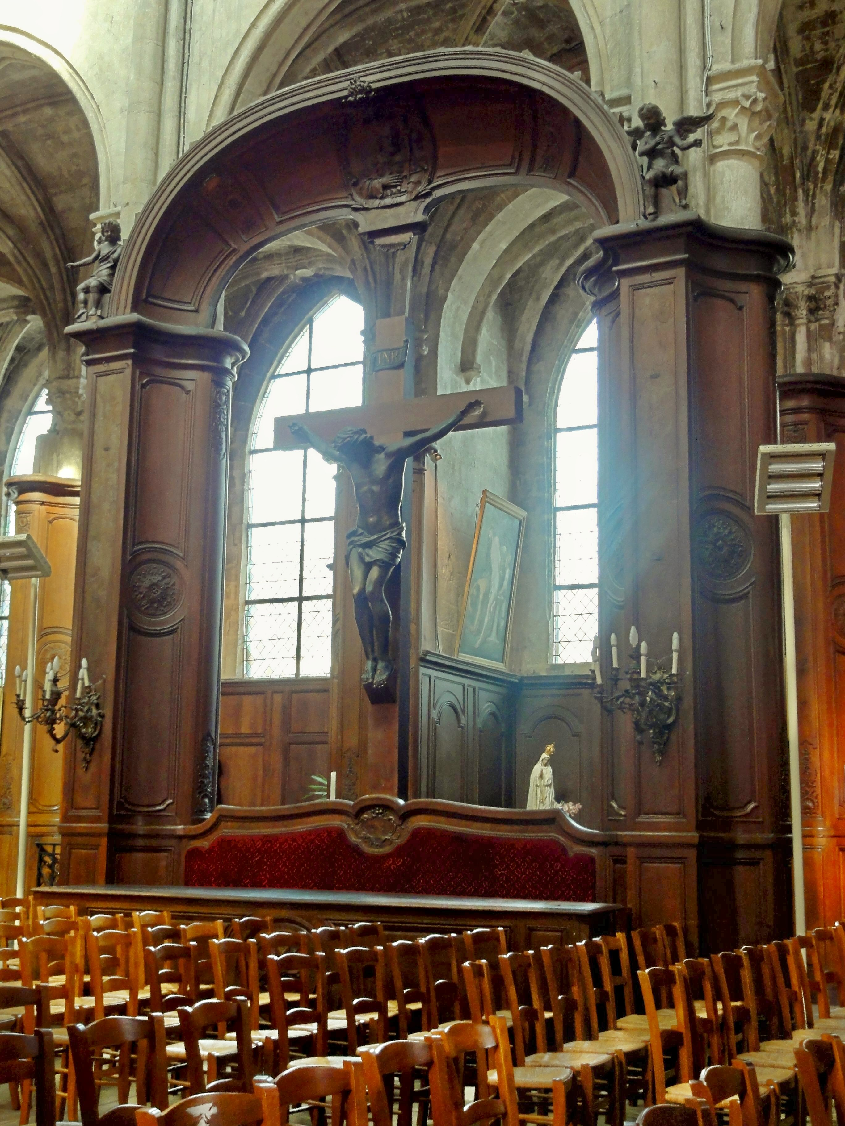 Le banc d'œuvre de 1758.